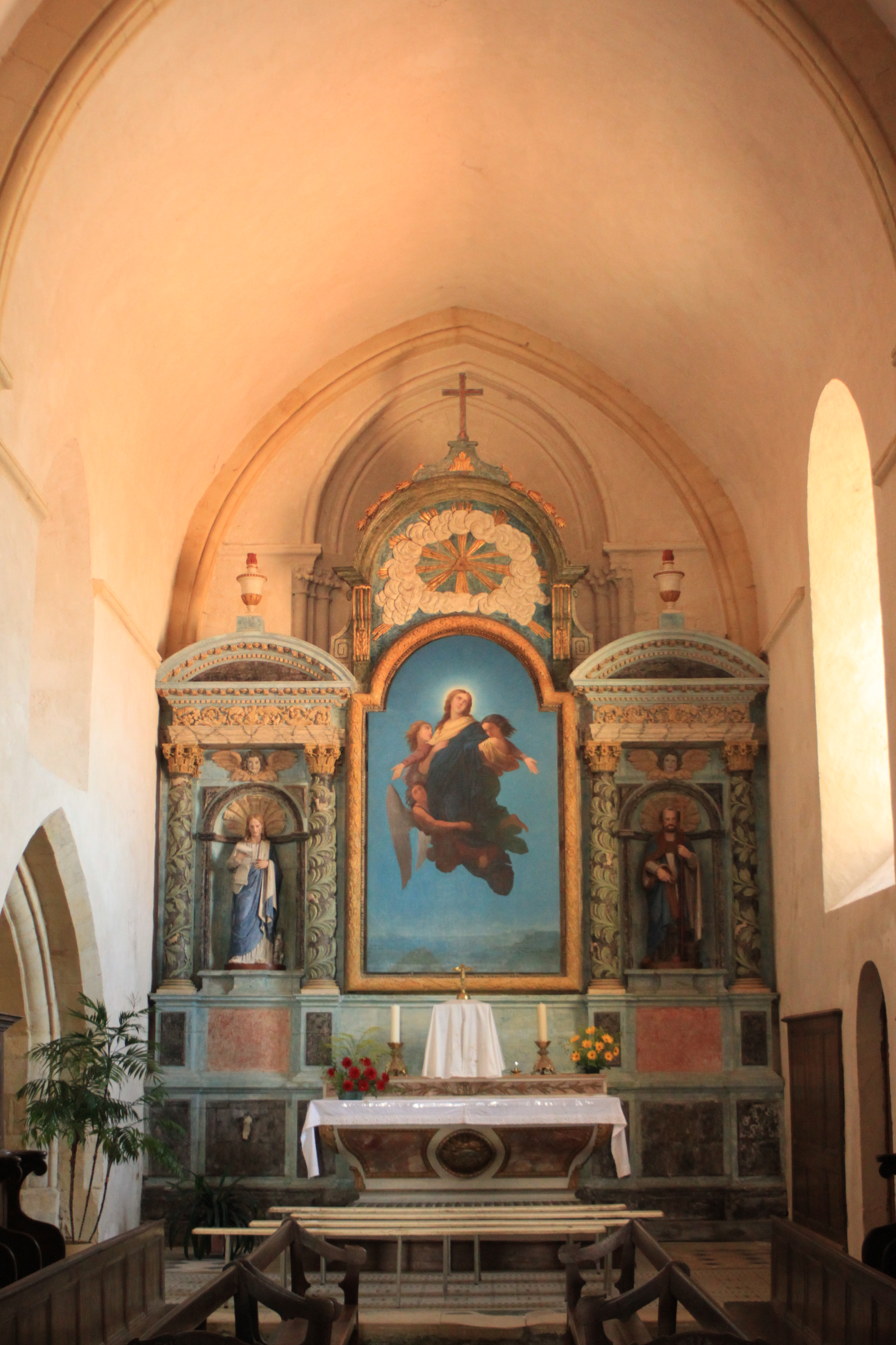 Chœur de l'église Notre Dame de l'Assomption, Fr-85-Longeville-sur-Mer.